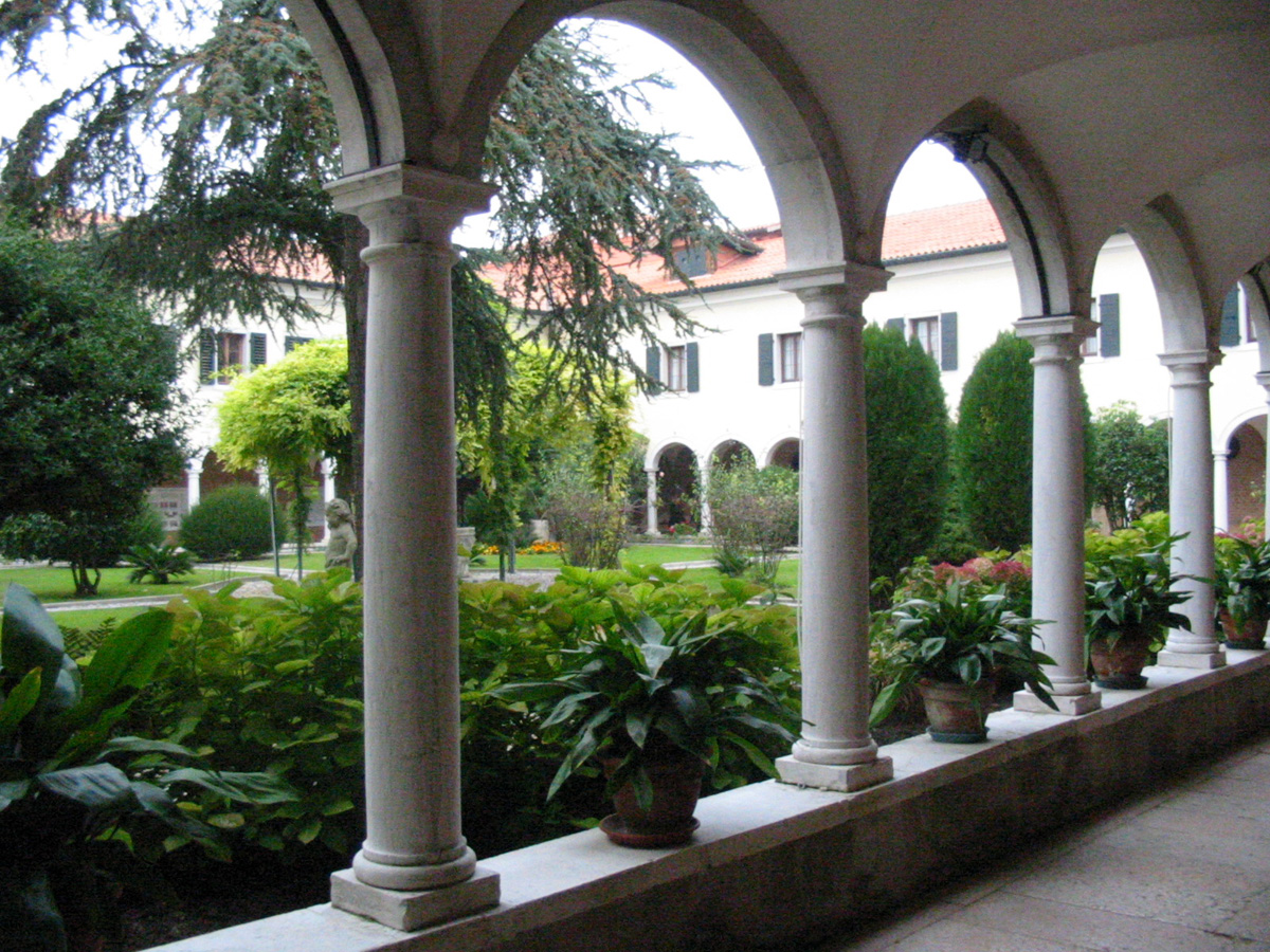 Monastère Santo Lazzari degli Armeni à Venise